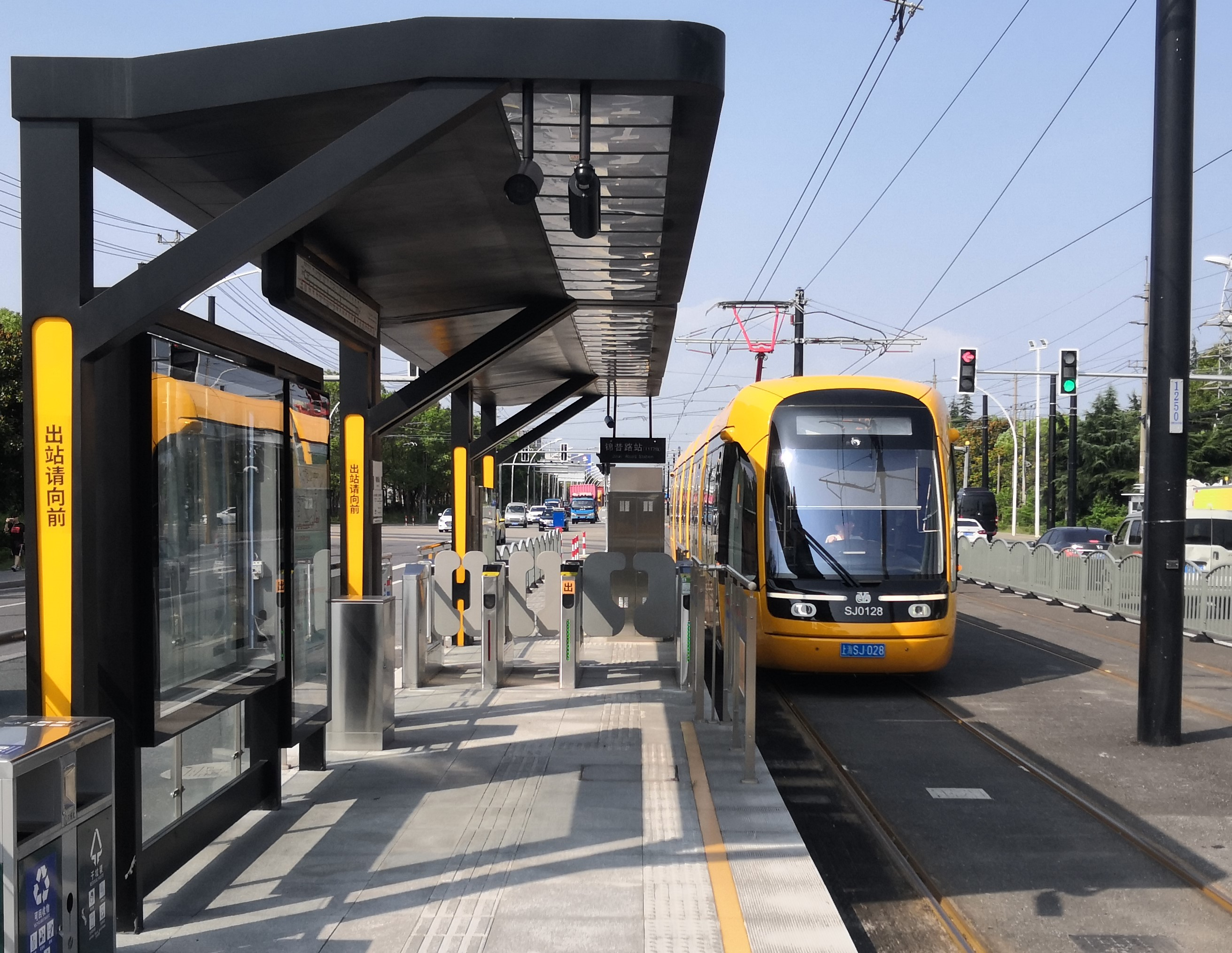 松江有轨电车T1线列车正在进入锦昔路